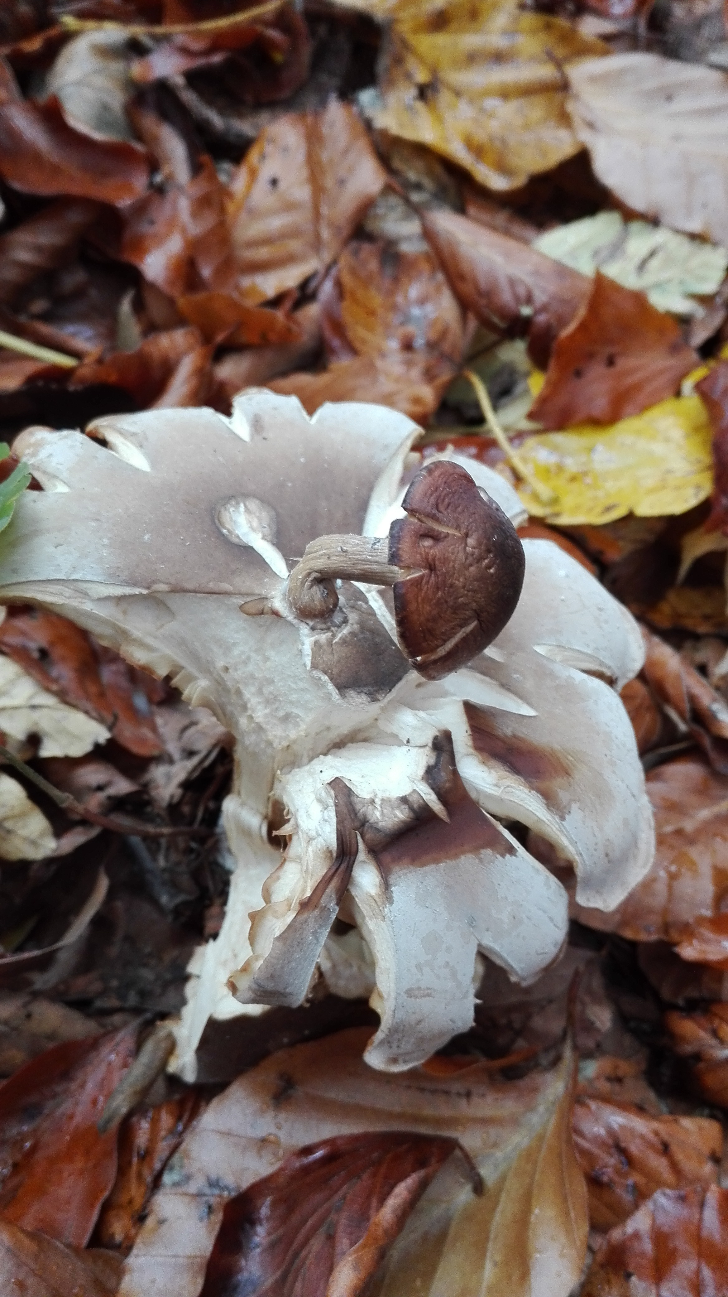 Kuriozita nalezena v Habrůvecké bučině